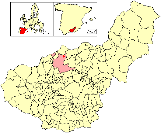 Situación de la entidad local autónoma de Domingo Pérez (en el municipio de Iznalloz) respecto a la provincia de Granada, en España.